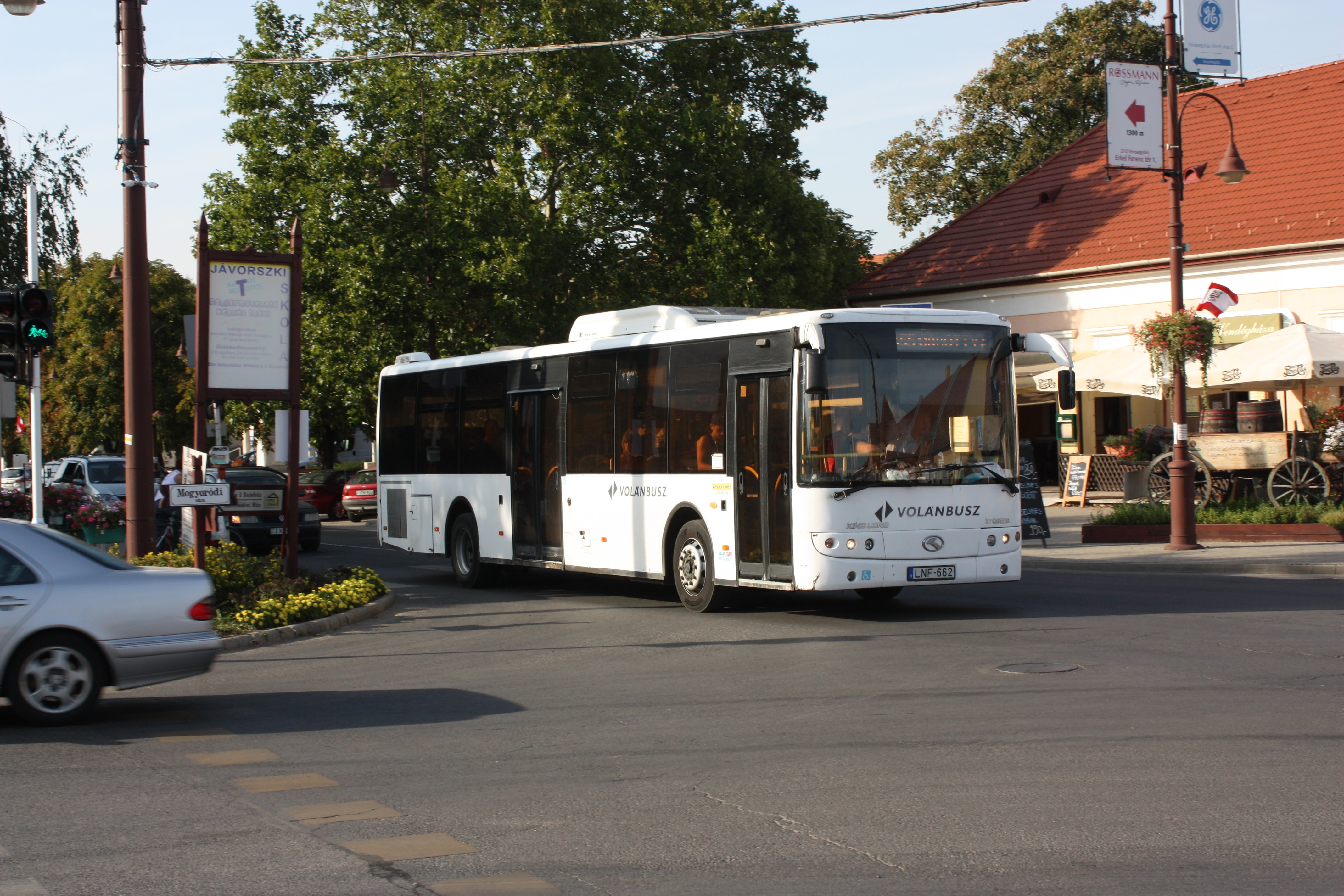 LNF-662 rendszámú KingLong XMQ6121G a 455-ös járaton Gödöllő felé Veresegyházon